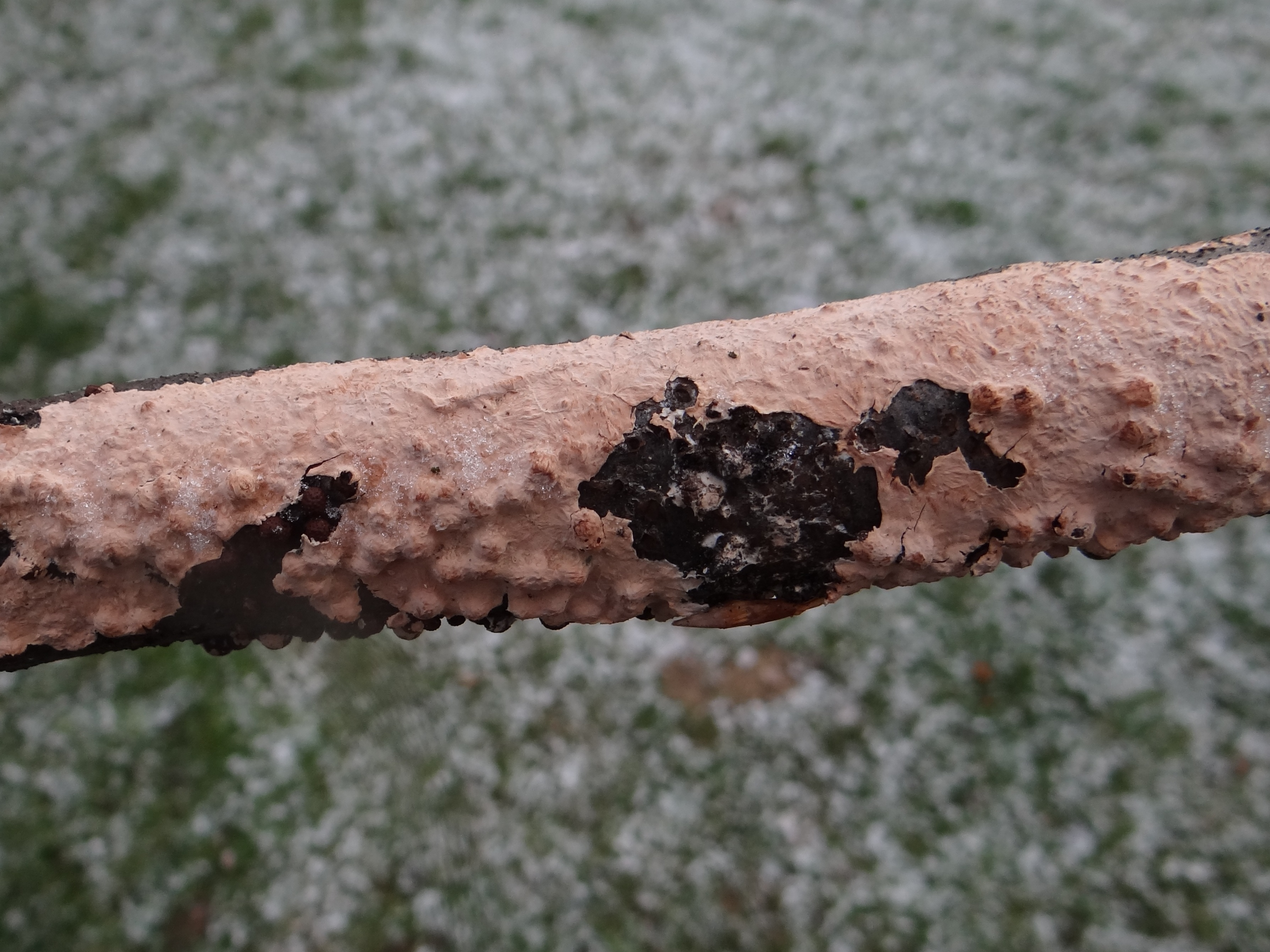 Peniophora violaceolivida